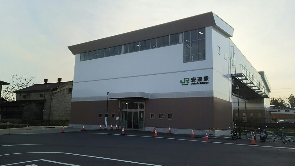 JR東日本東北本線安達駅の新駅舎です。